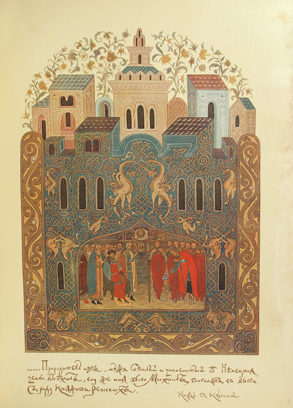 Прибытие князя Михаила Гланды Камбилы на Русь, в Великий Новгород. Летописный и Лицевой Изборник Дома Романовых. [В 2-х выпусках]. Издание С.С. Ермолаева под общей редакцией князя М.С. Путятина, художественный отдел под редакцией С.И. Вашкова. Москва, товарищество скоропечатни А.А. Левенсон, [1913]. Летописный и Лицевой Изборник Дома Романовых. Юбилейное издание в ознаменование 300-летия царствования, 1613-1913.